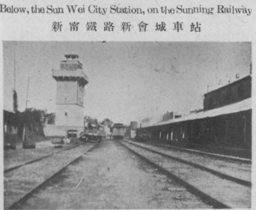 中文（香港）: 新寧鐵路新會城車站